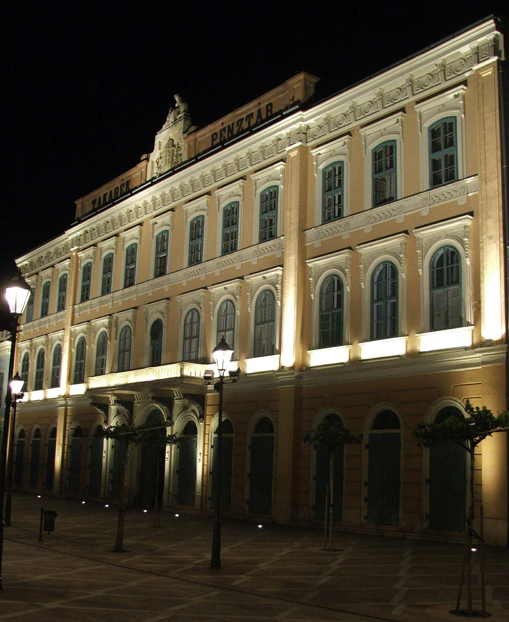 Bank building in Esztergom